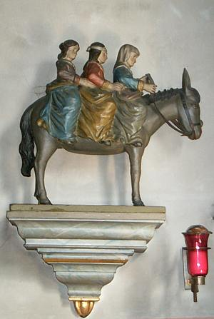 Mariä Himmelfahrt (Auw an der Kyll): Statue der 3 Jungfrauen auf dem Esel